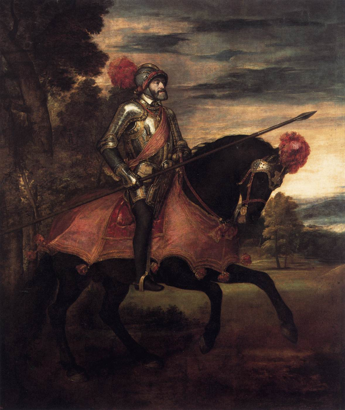 Retrato ecuestre del emperador Carlos I de España (1500-1558), que aparece llevando la armadura que usó en la batalla de Mühlberg, que se libró en 1547 y en la que el emperador derrotó aplastantemente a los protestantes alemanes.